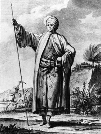 Carsten Niebuhr (1733-1815), geograf og opdagelsesrejsende, En ung Niebuhr i lokalt kostume under en opdagelsesrejse.